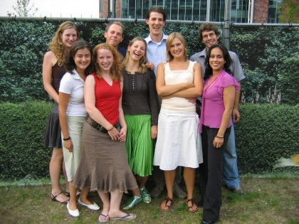 Foto van de fSr ALW 2006-2007 (facultaire Studentenraad Aard- en Levenswetenschappen aan de VU in Amsterdam).